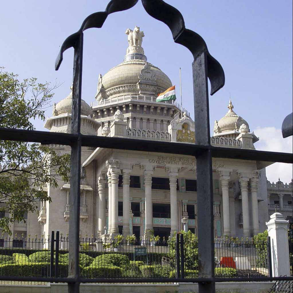 Bangalore Vidhana Soudha Vidhana Soudha - Palast des Volkes. 1956 aus poliertem Granit errichtet. Fotografiert: 11/2004 Autor: Gerd A.T. Müller